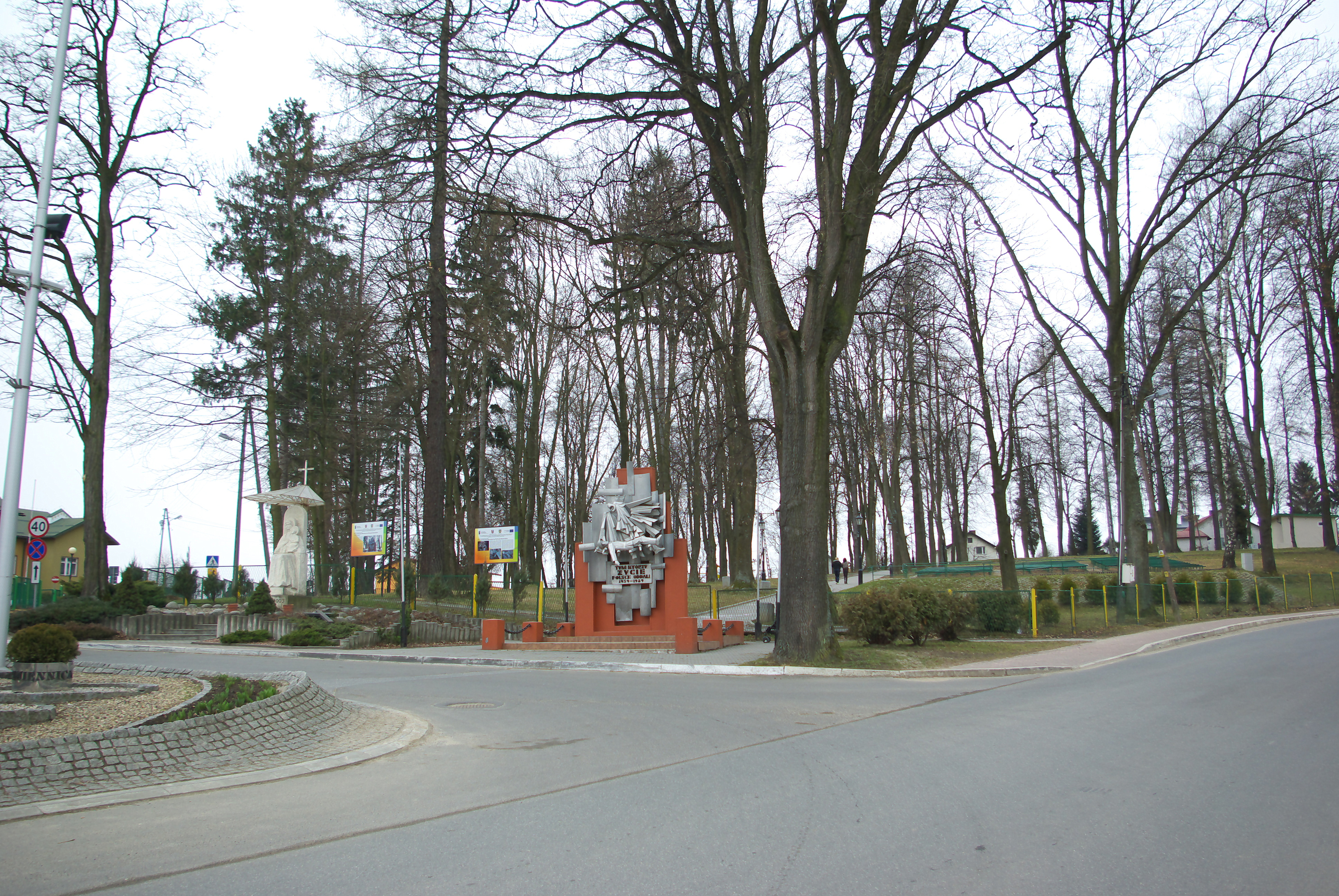 Park jordanowski w Brzozowie